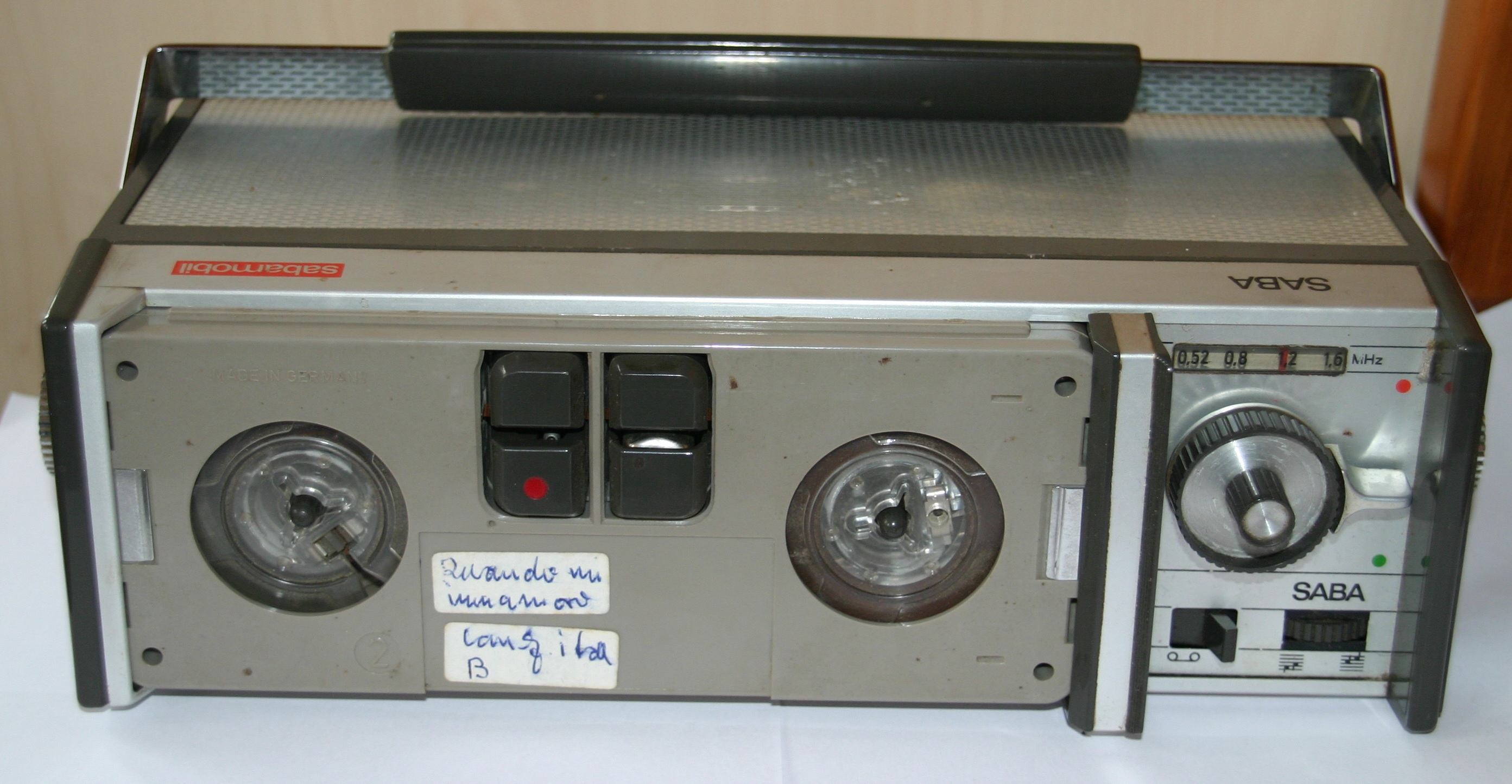 Sabamobil liegend mit Kasette Den größten Teil der Oberseite nimmt die Kasette ein. Die vier Rechtecke, die aus der Kasette hervorschaeun, beherbergen Tonköpfe und Capstan. Das Band läuft zwischen den beiden oberen und den beiden unteren Rechtecken. Das rot Gekennzeichnete könnte der Aufnahmekopf sein. Ganz rechts unten der Lautstärkeregler, daneben der Umschalter Tonband/Mittelwelle. Darüber der Aufnahme-/Wiedergabe-Knebel mit integriertem Grob/Feinregler für die Mittelwellenfrequenz. Oben die Skala für die Mittelwellenfrequenz.